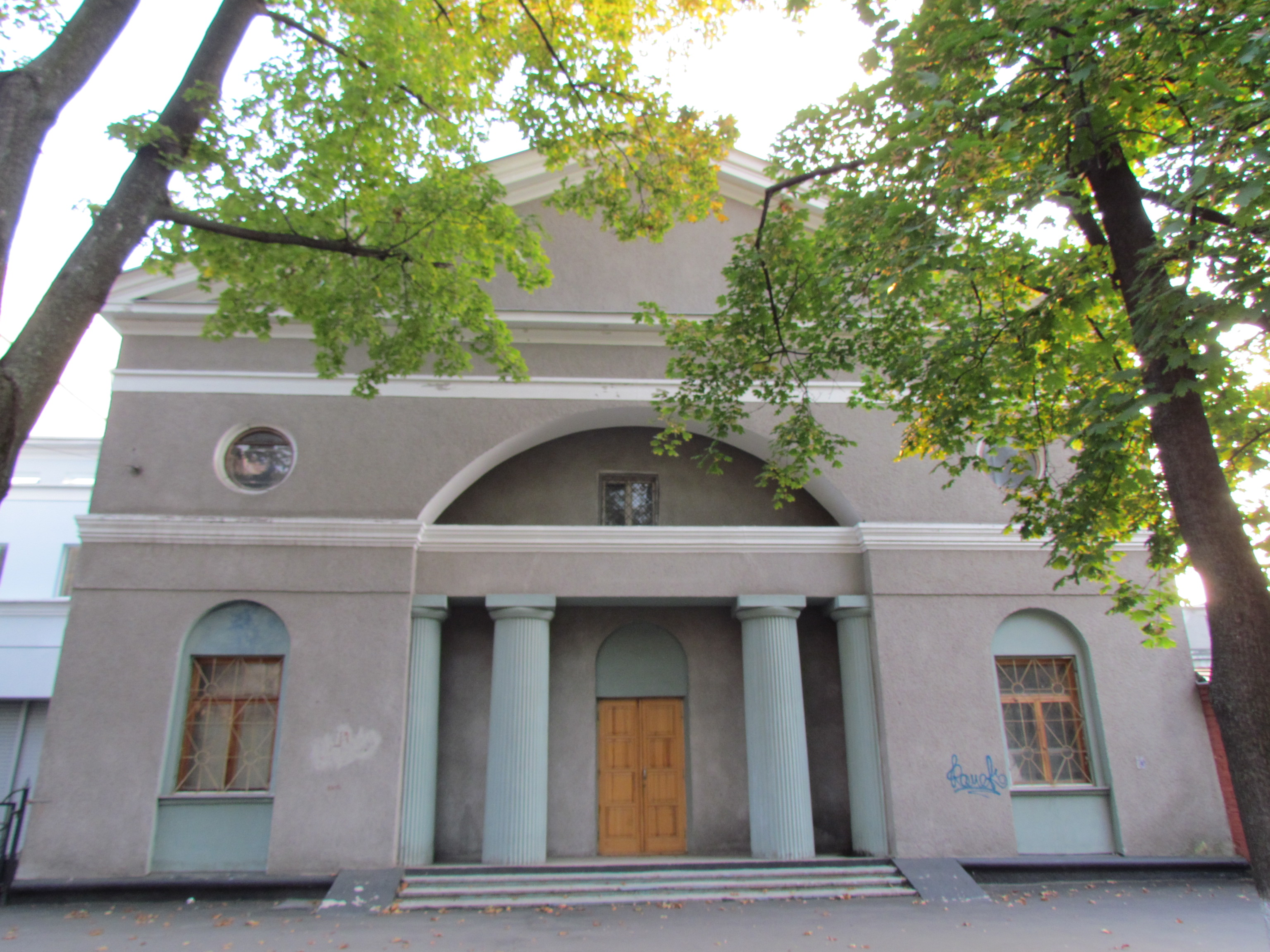 Україна, Харків, вул. Каразіна, 20